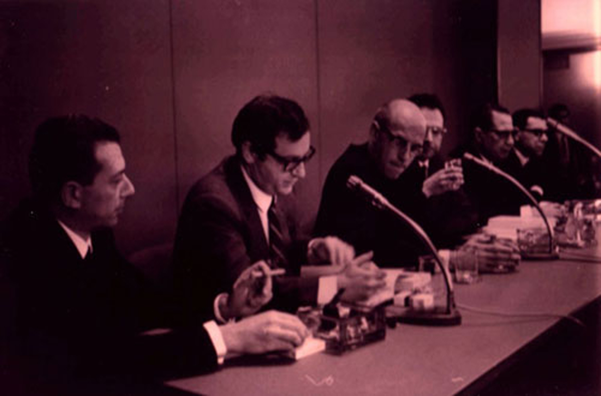 Fotografia del filosofo italiano Enzo Melandri in un convegno del 1968. Melandri è il terzo da destra, seduto tra Umberto Eco e Michel Foucault.